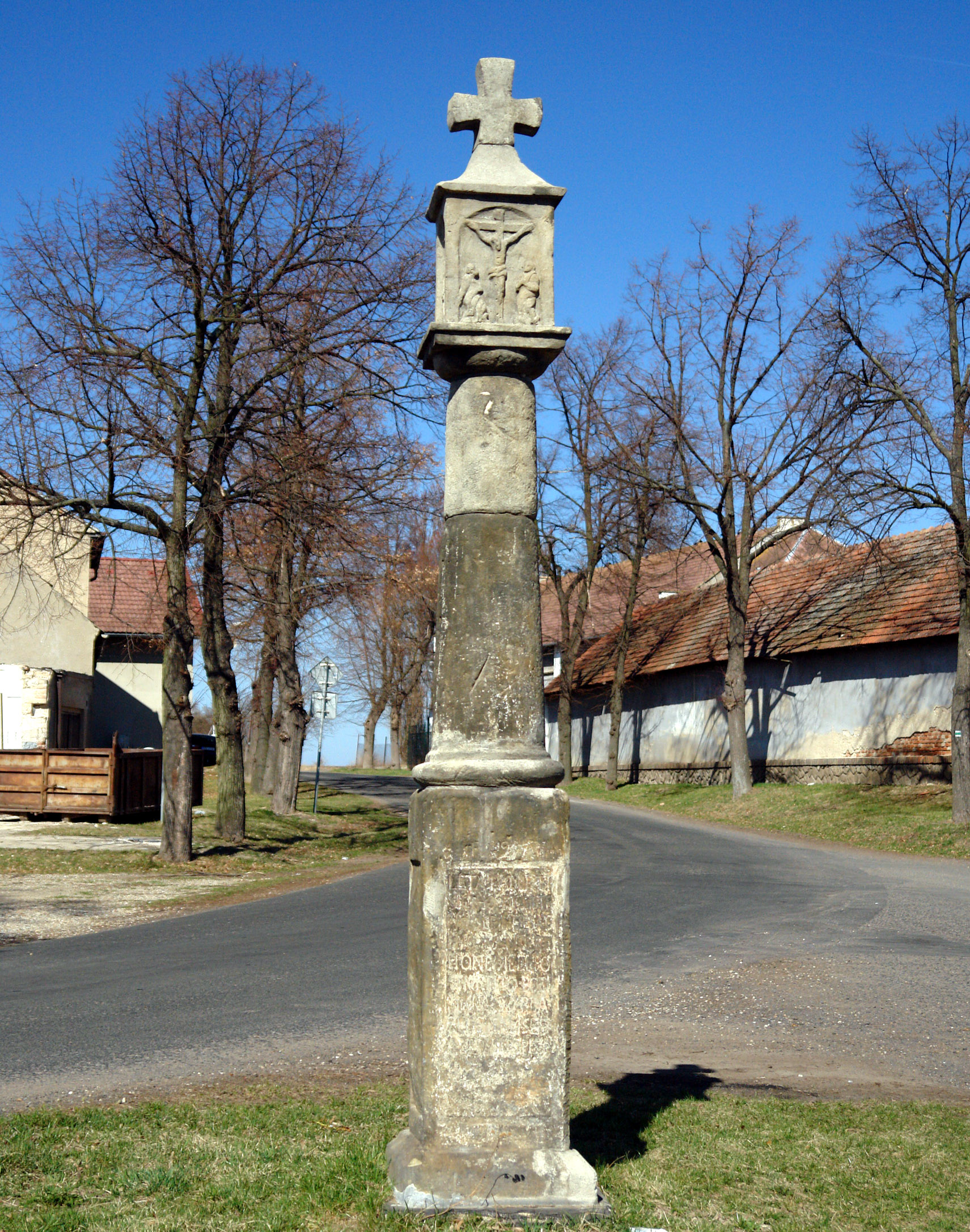 Boží muka (Brníkov), Brníkov